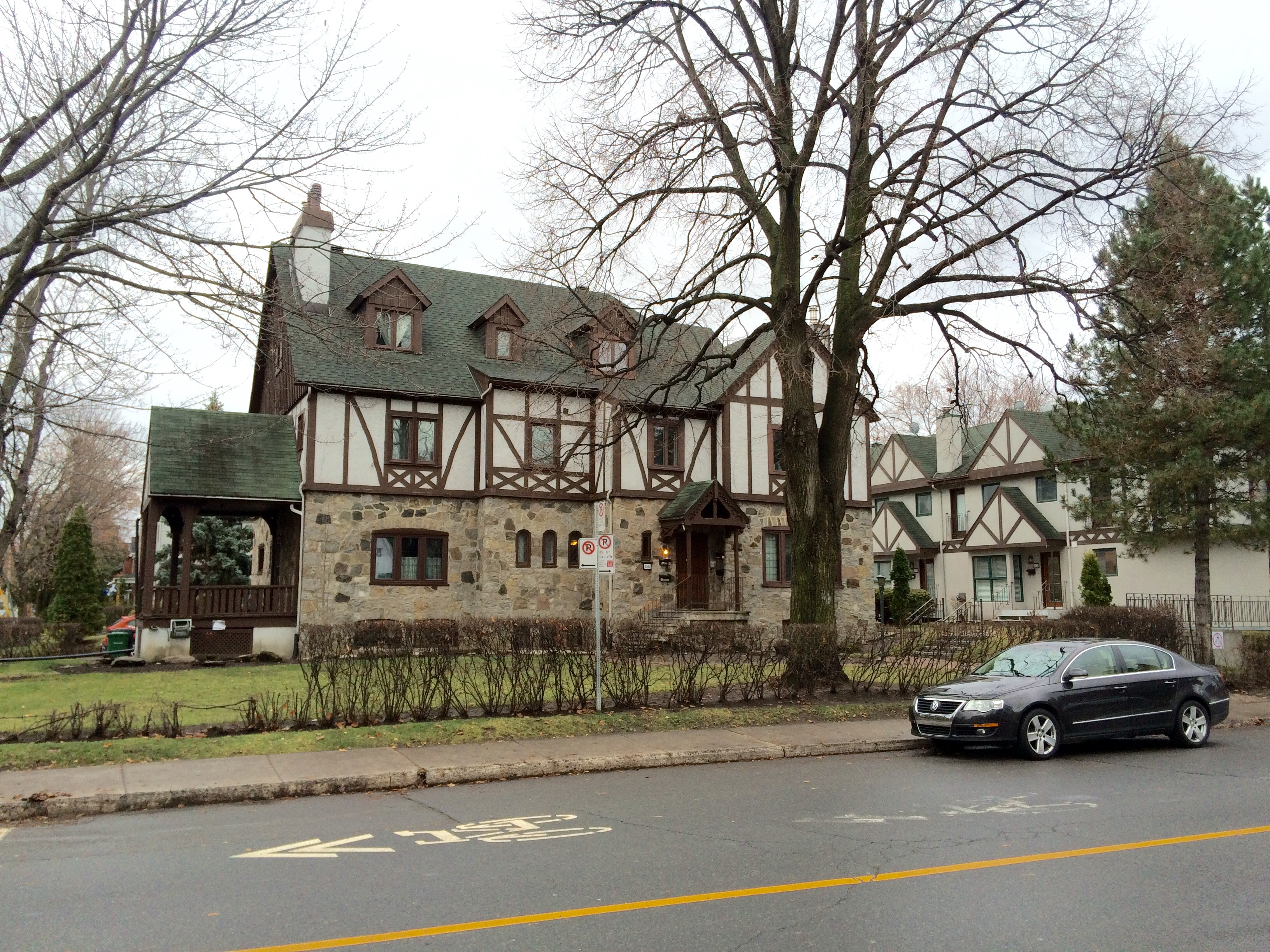 St Laurent